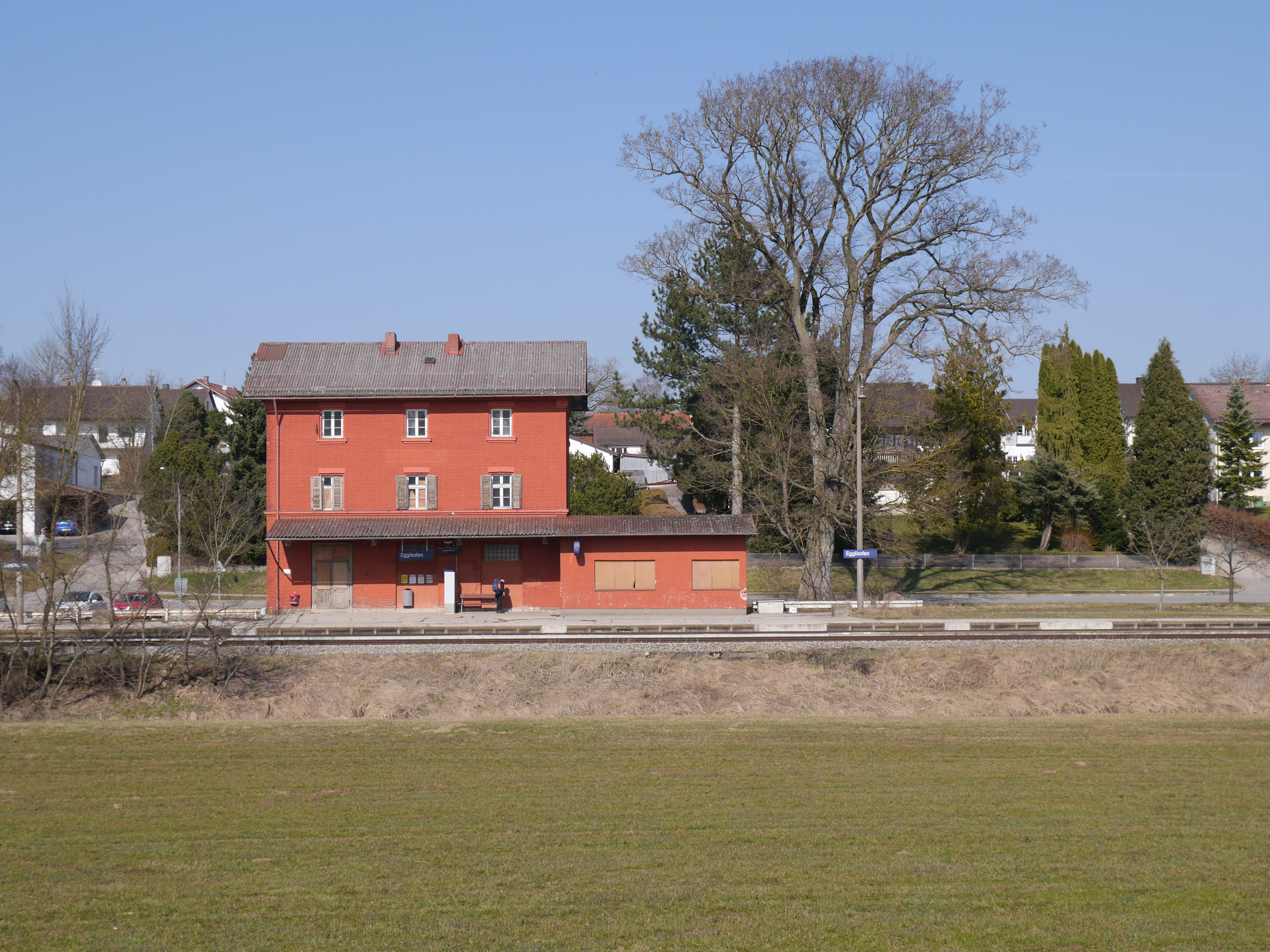 Empfangsgebäude und Hausbahnsteig des Bahnhofs Egglkofen, von der Eberlstraße